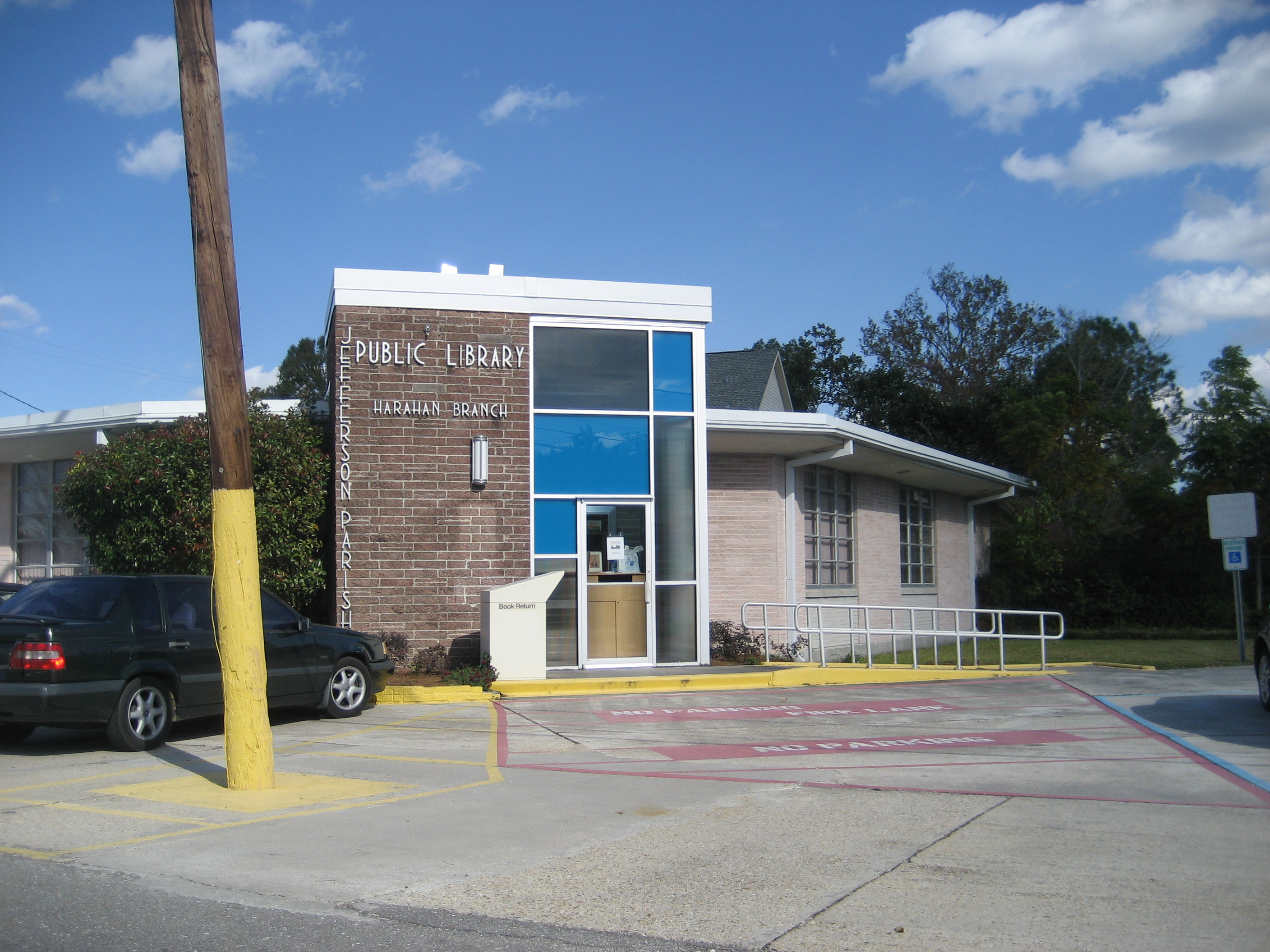 Harahan, Louisiana, Public Library